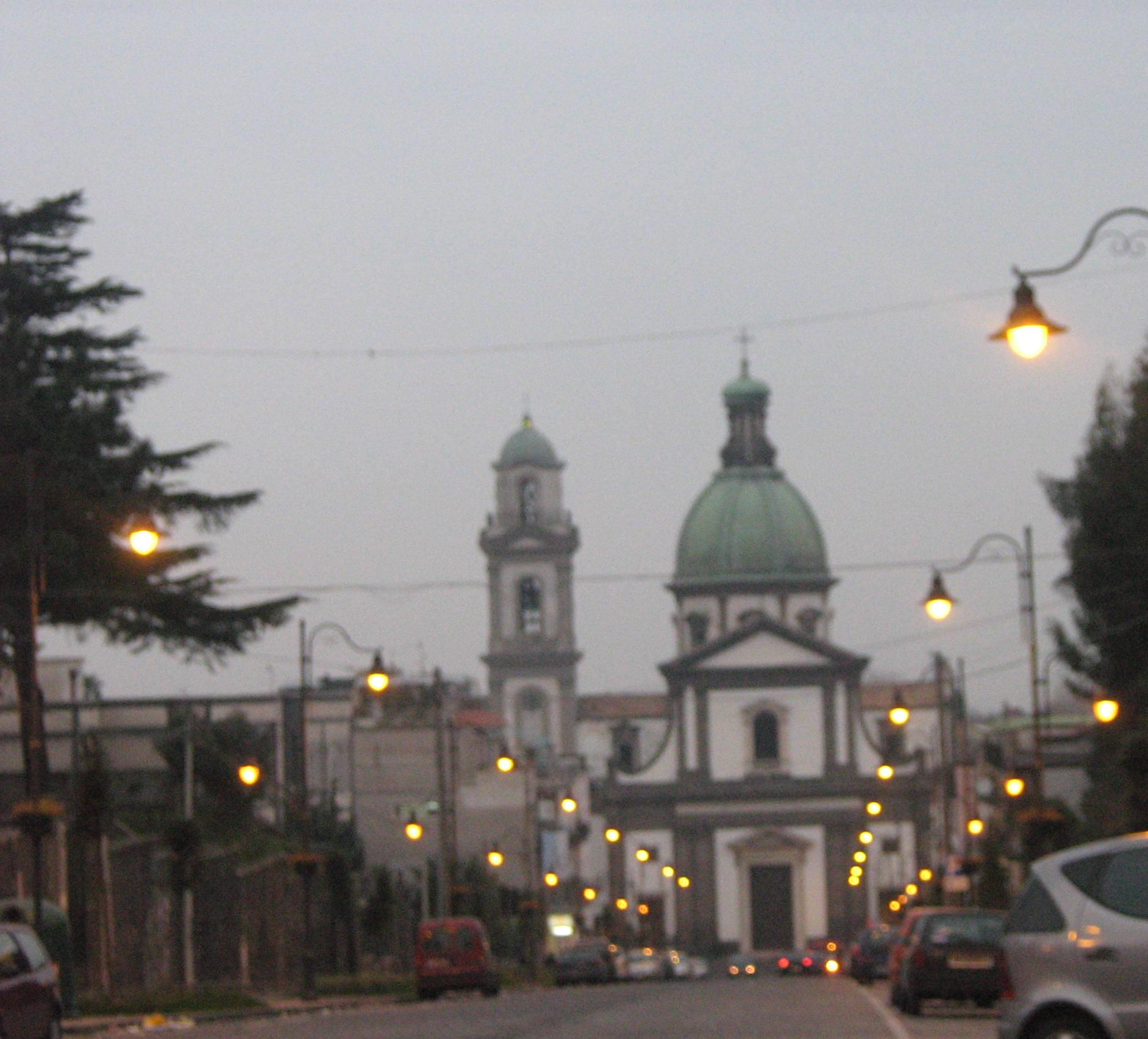 Sono io l'autore, Lusb e questa è un'immagine di mia proprietà.